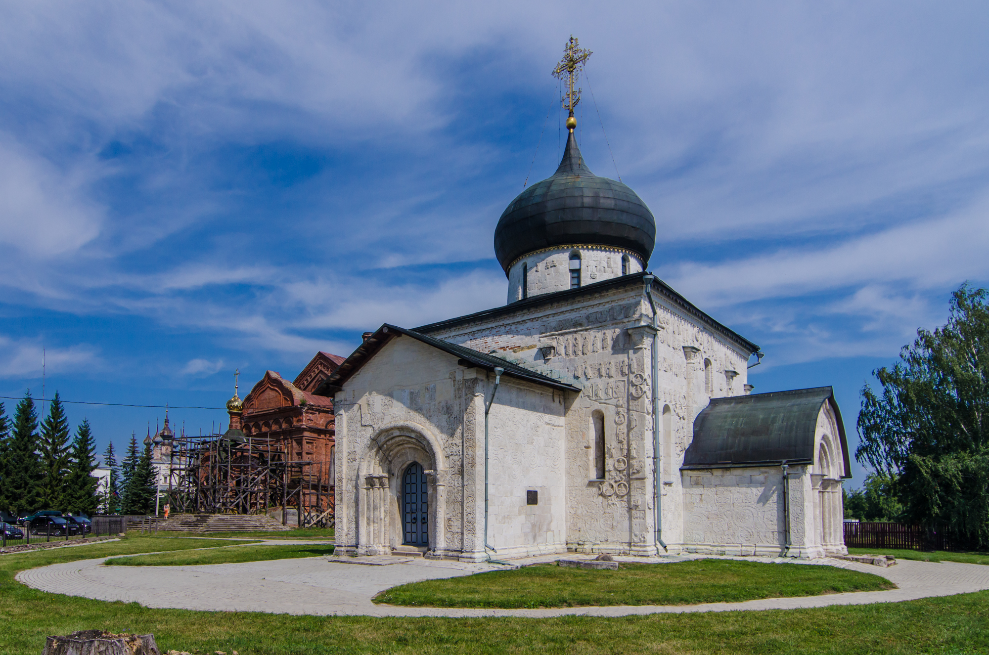 Собор Георгиевский (Георгиевский собор и земляные валы городища): улица 1 Мая, Юрьев-Польский, Юрьев-Польский район, Владимирская область